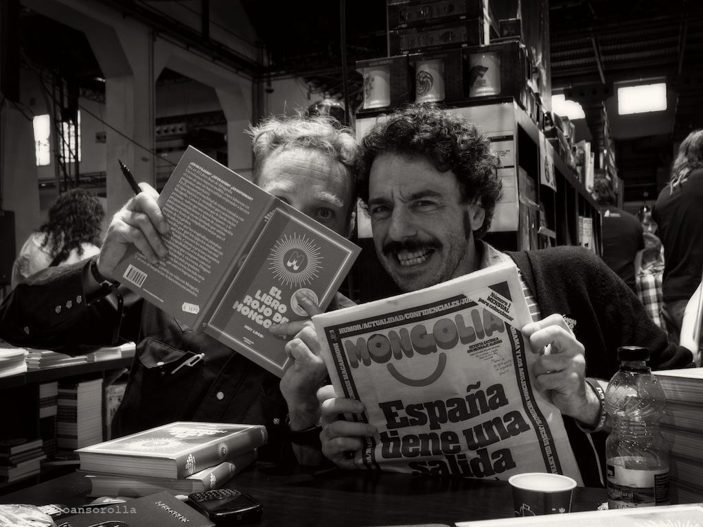 Rapa Carballo y Darío Adanti trabajando duramente :) en la firma de ejemplares en el "31 Saló del Còmic de Barcelona".